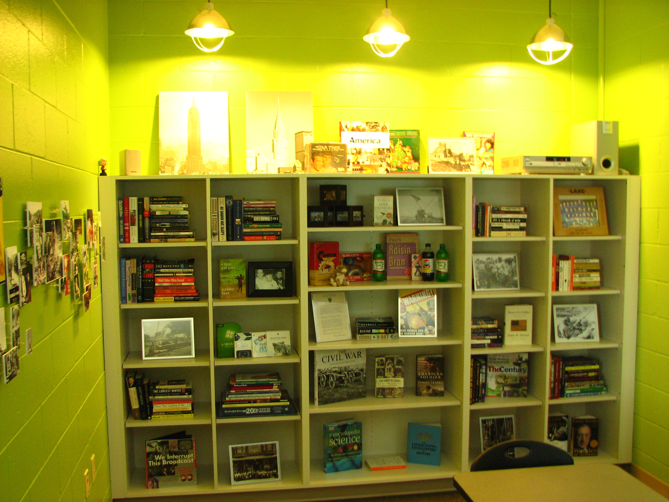 מדפי ספרים בתוך ארון.